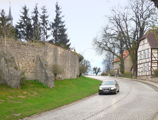 Lucklum